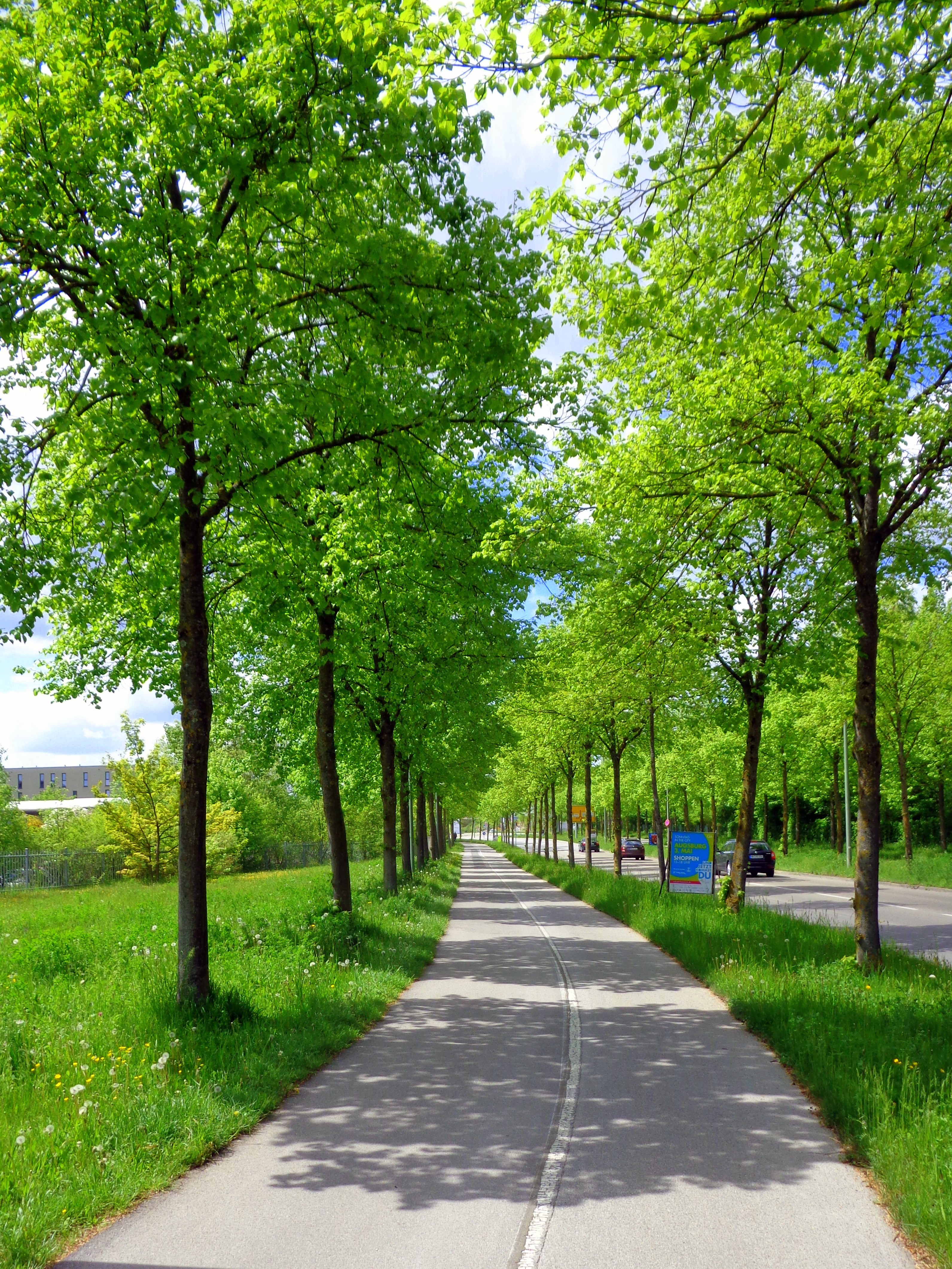 alley